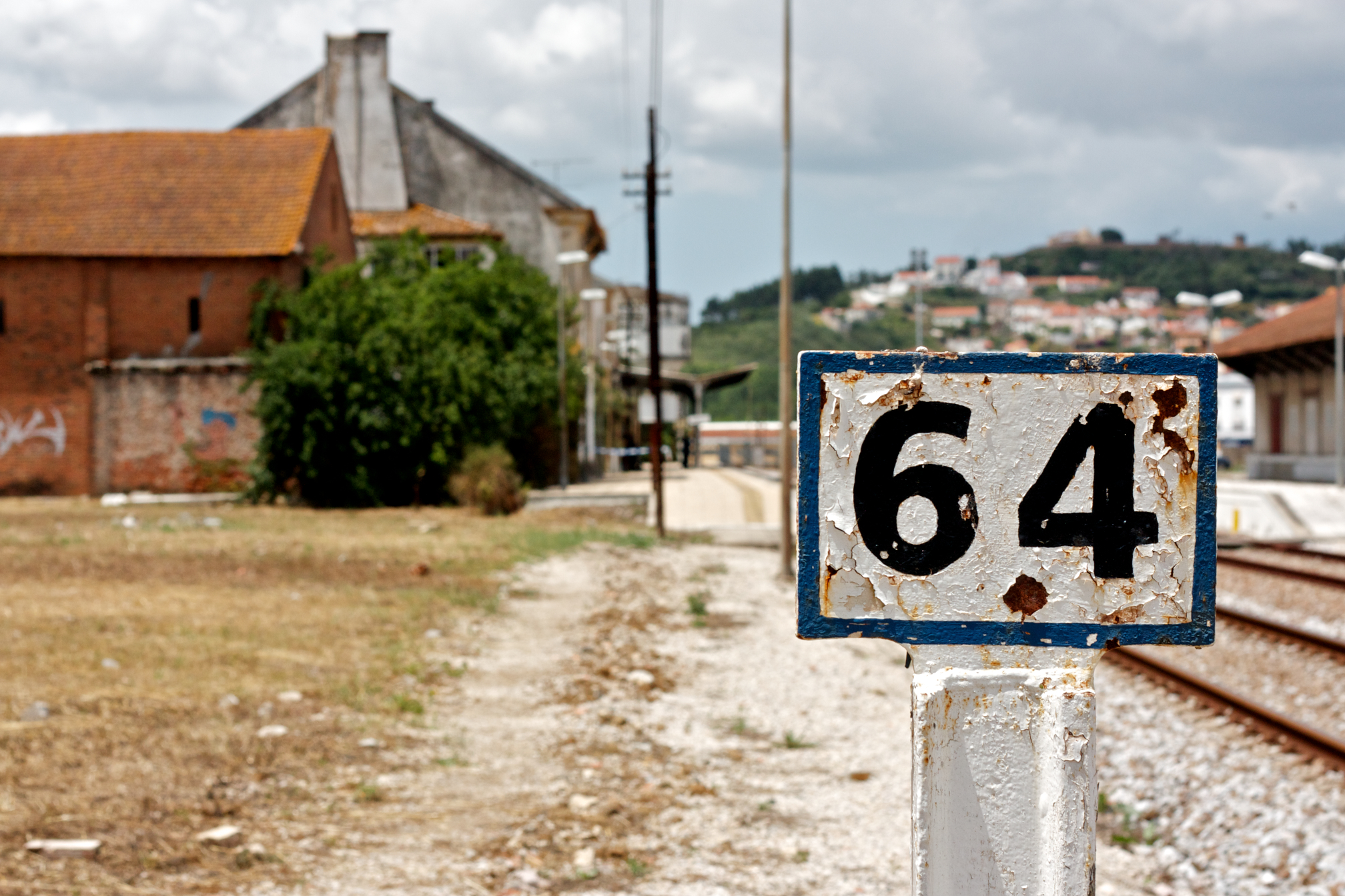 Tipo: E Estação Local: Torres Vedras [Linha do Oeste, PK 64] Data e hora: 19 de Maio de 2011 [13h55]